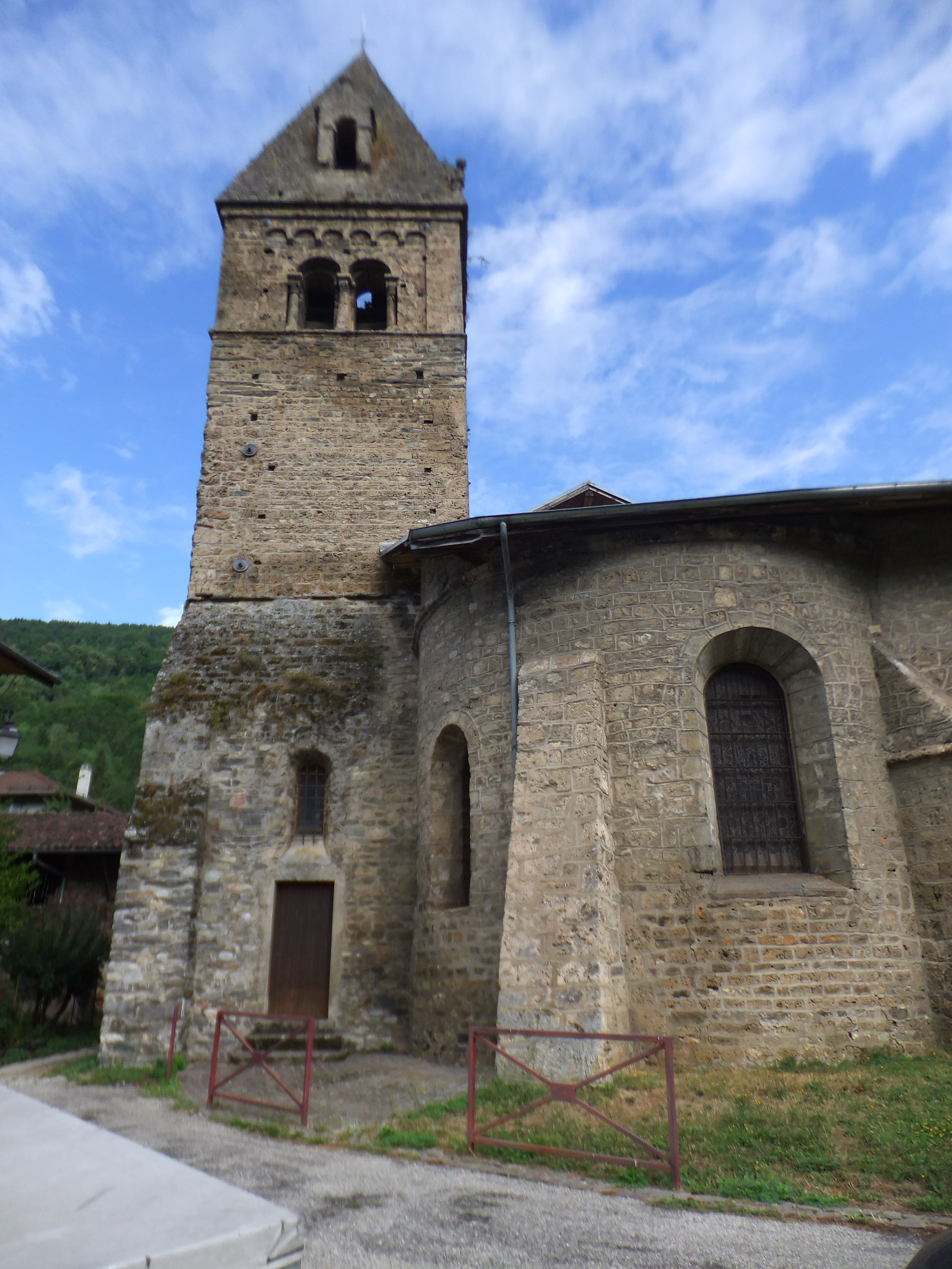 Chevet et clocher de l'église de Saint-Pierre d'Allevard. La souche du clocher, massive, est aveugle jusqu'à l'étage des cloches, aux fenêtres géminées. Une porte (récente) permet d'accéder à la pièce située dans le clocher, une ancienne chapelle.